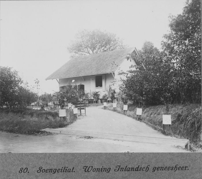 foto. Woning van een Indonesische arts in Soengailiat